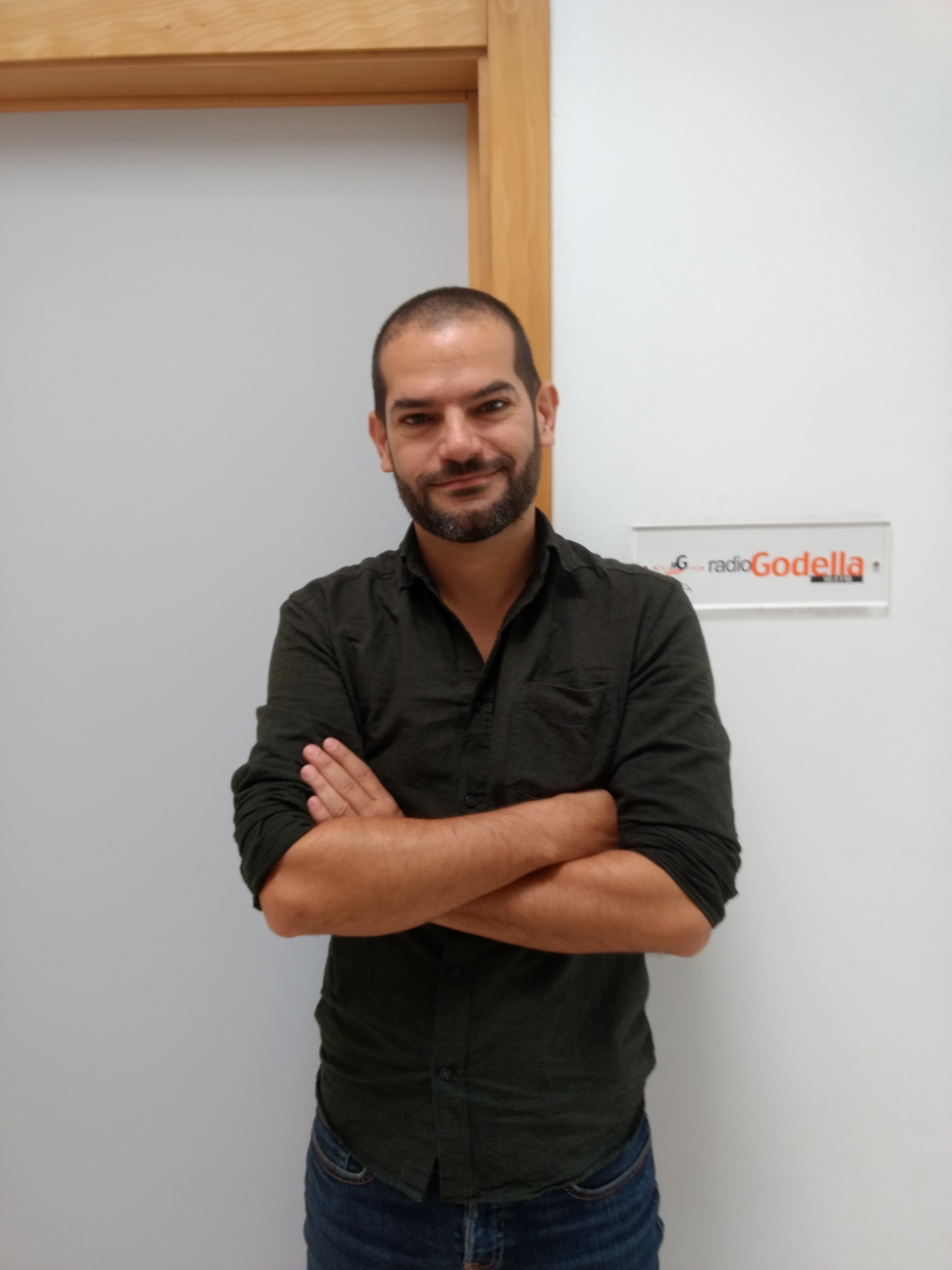 David Segarra als estudis de Ràdio Godella.